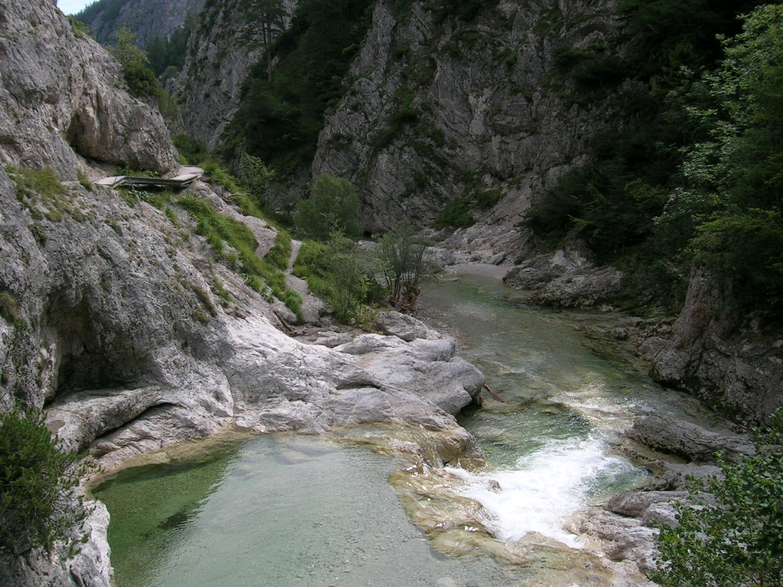 In den Ötschergräben (NÖ, Ybbstaler Alpen) Ötscherbach und Nordwand beim "Ötscherhias" fotogr. Geof August 2006